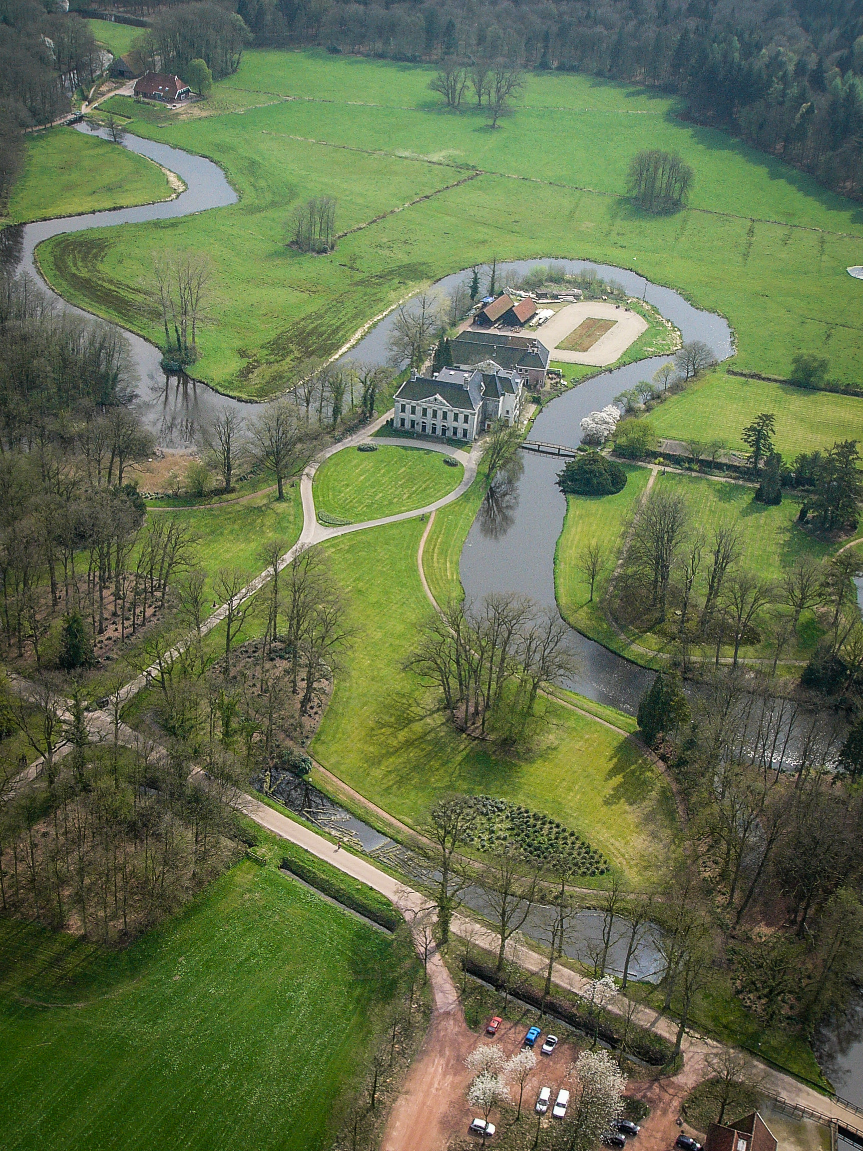 Singraven luchtfoto 15 april 2005